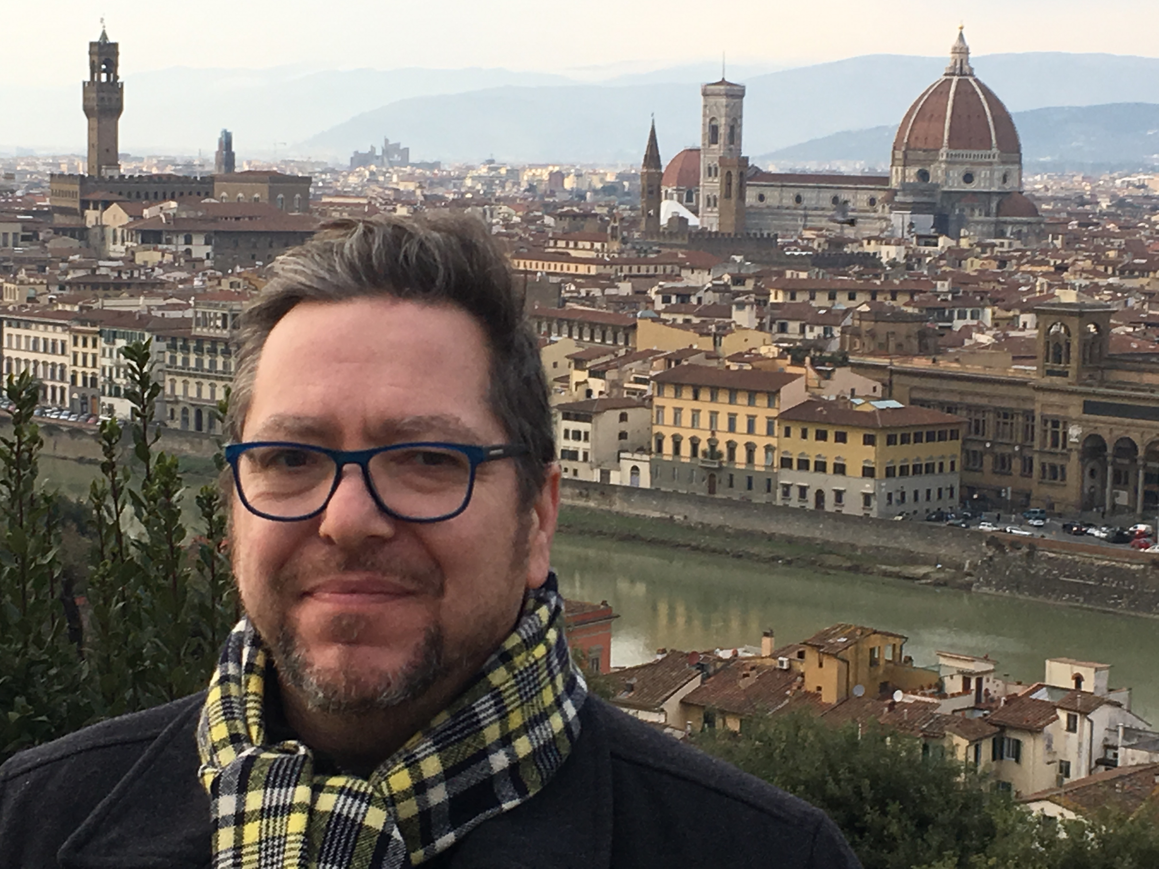 Francis Catalano à Florence en 2017